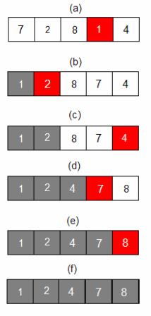 Udtagelsessortering